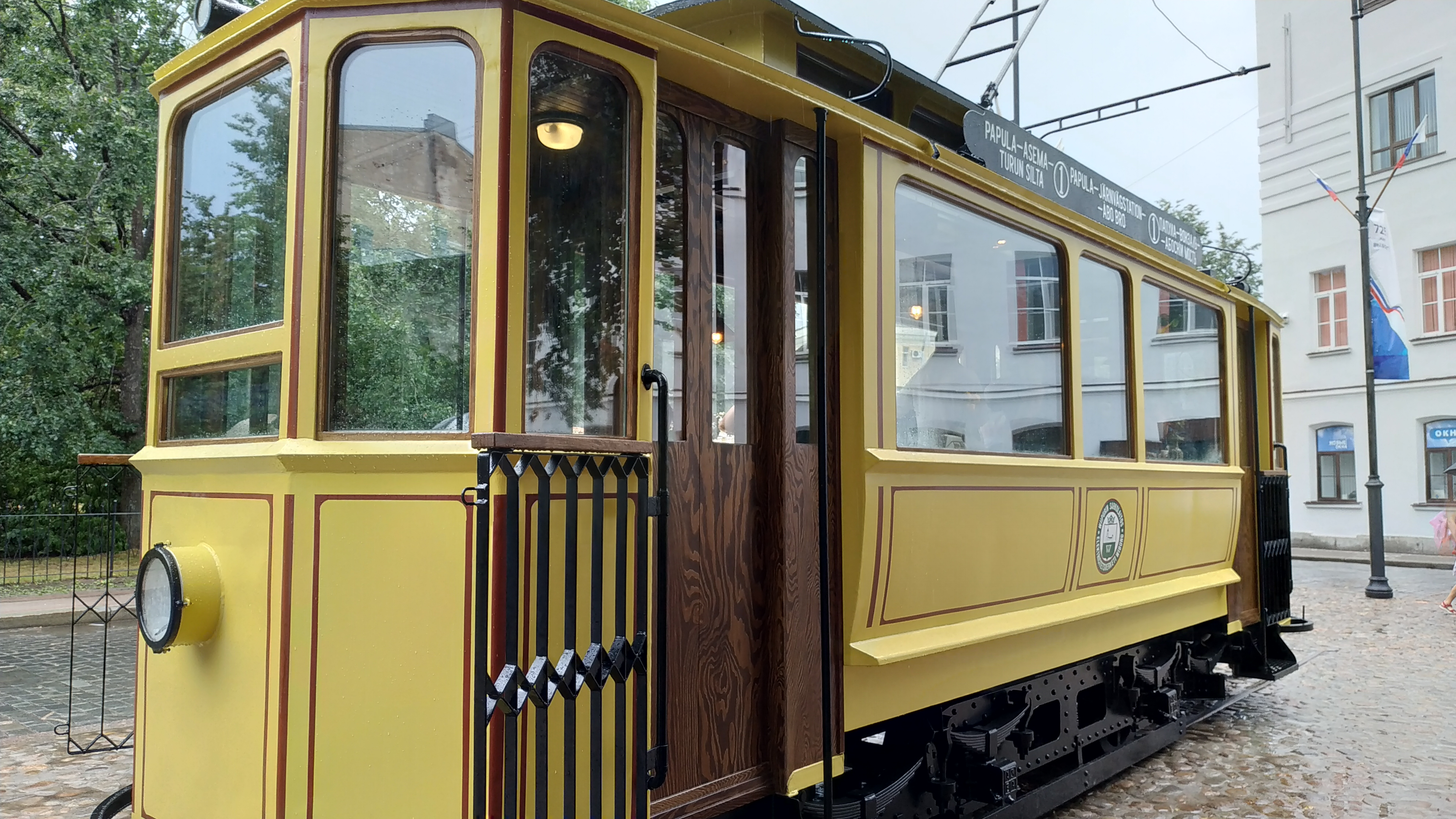 Внутри трамвая разместилась уютная кофейня, где жители и гости города смогут отдохнуть и выпить кофе, а вблизи, в сквере, расположены скамейки для отдыха на воздухе.